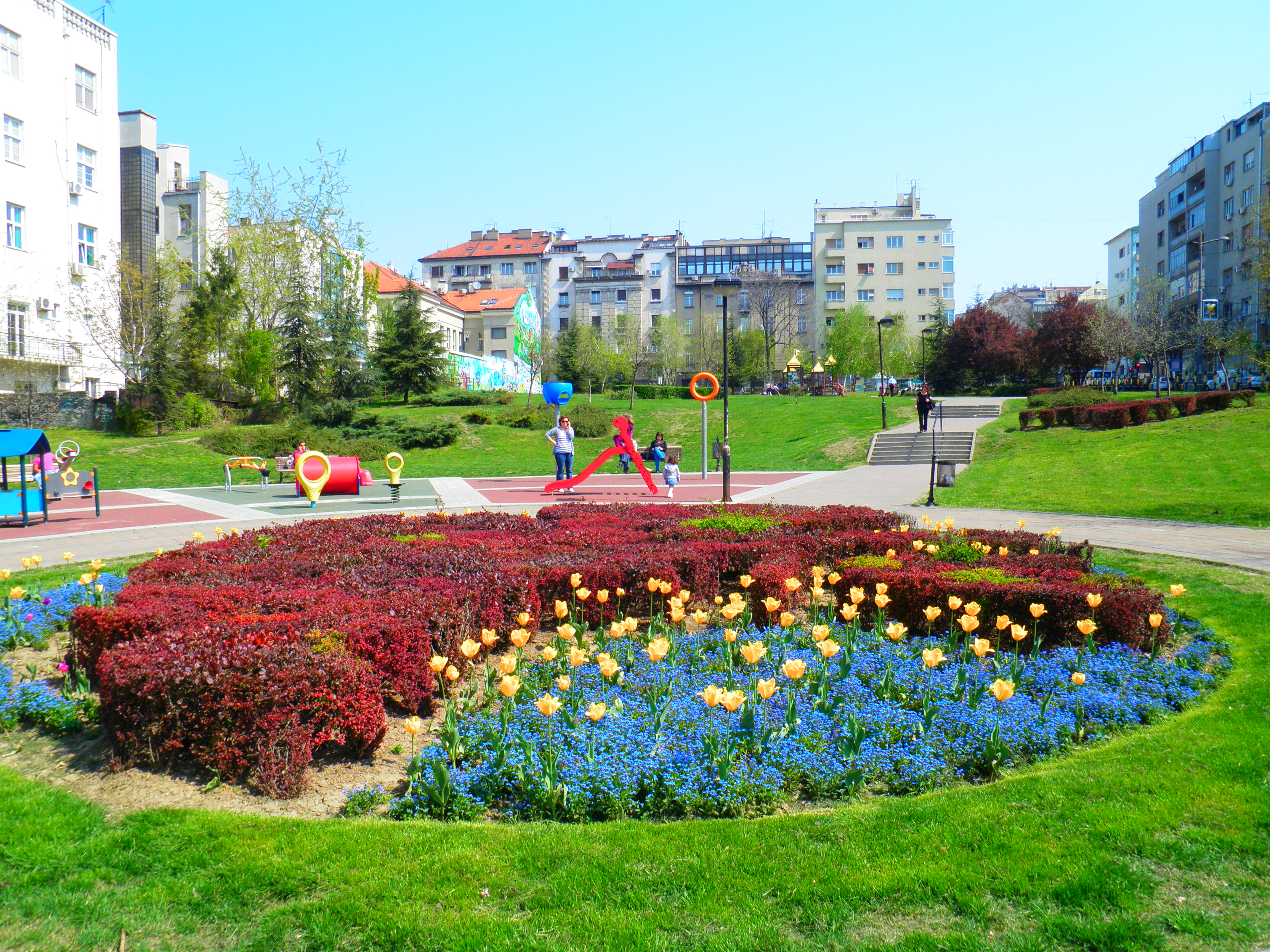 Slavija